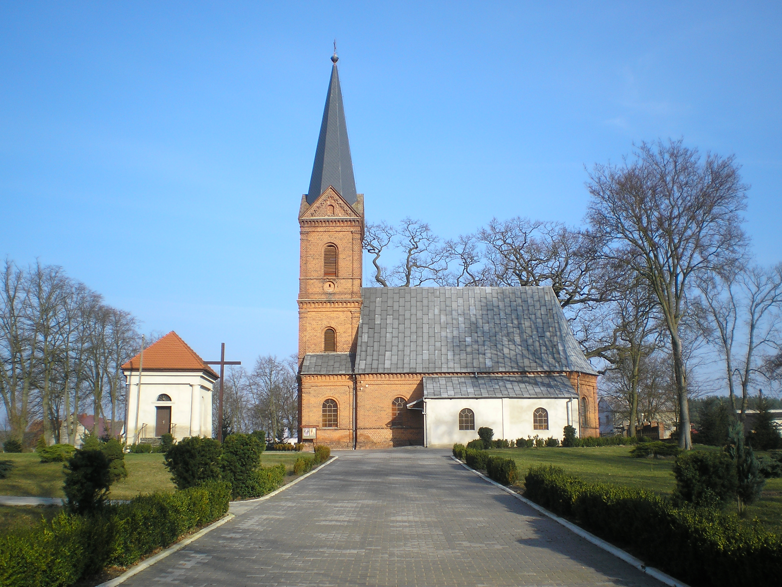 Kościół MB Różańcowej w Toporowie